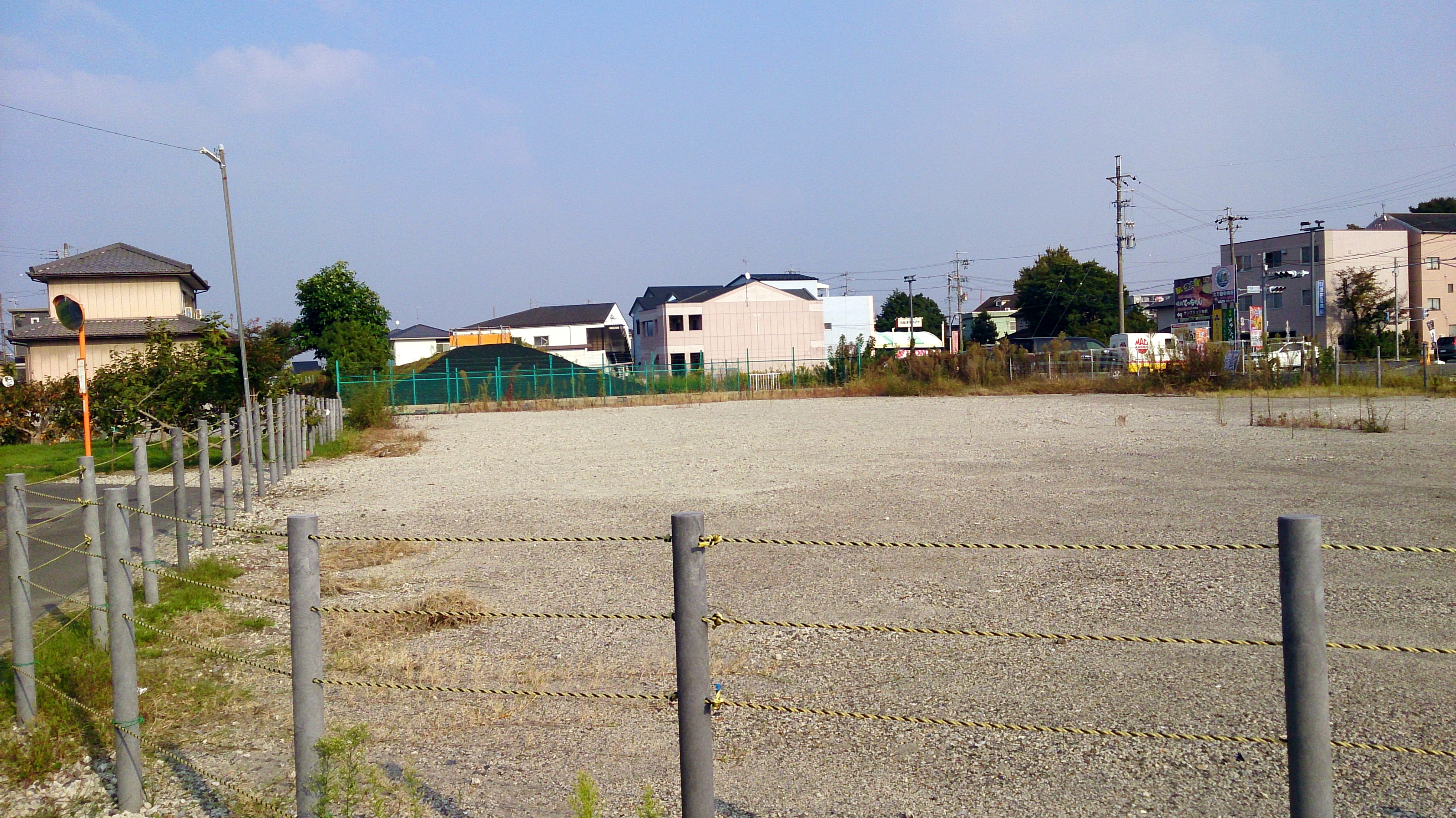 八ツ又駅から西側に当たる。立体交差部は撤去されたために更地となっている。